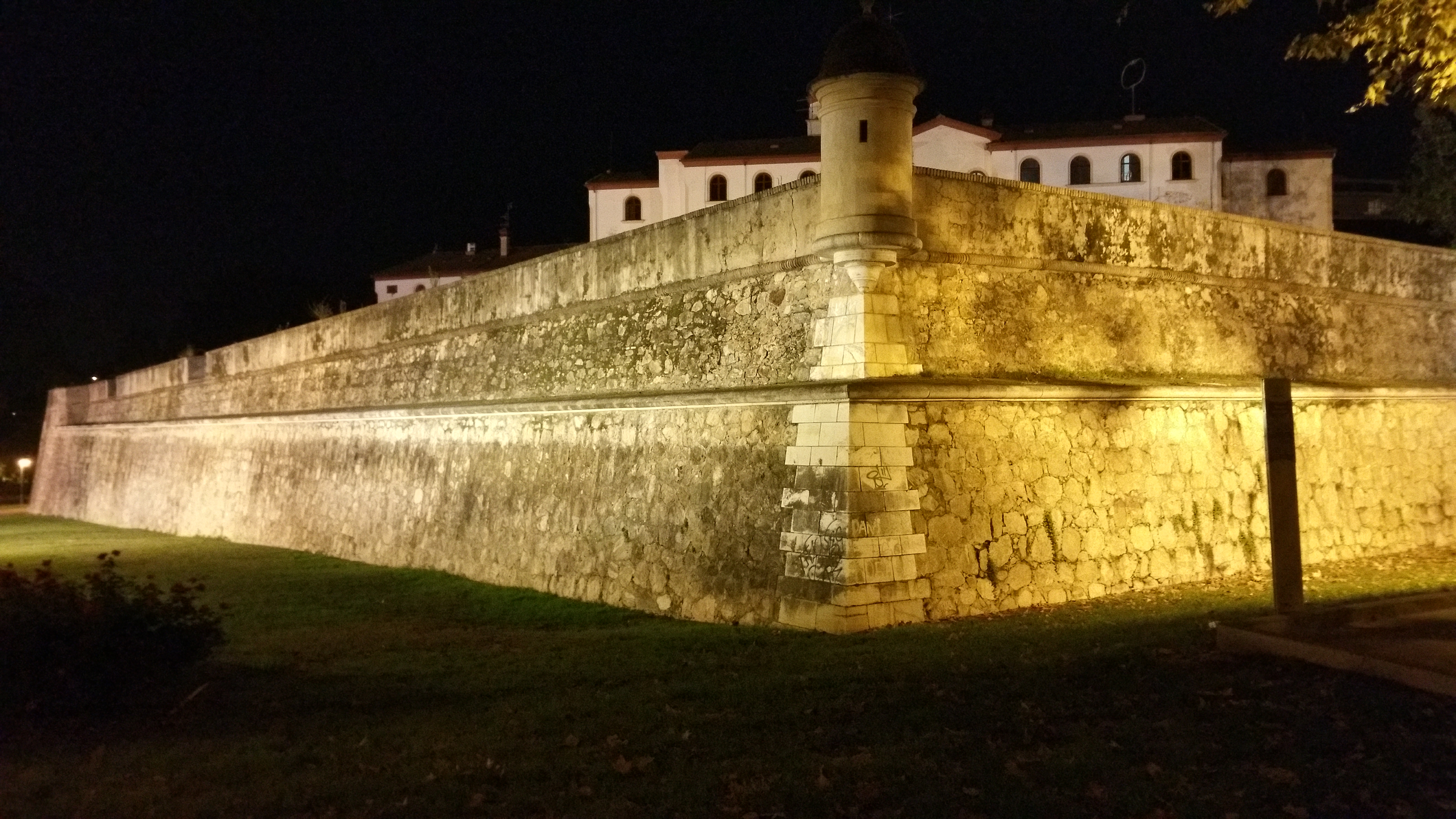 Vista nocturna de murallas sur y occidental.